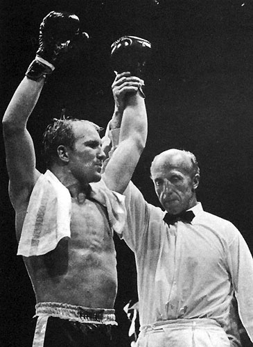 Bosse Högberg